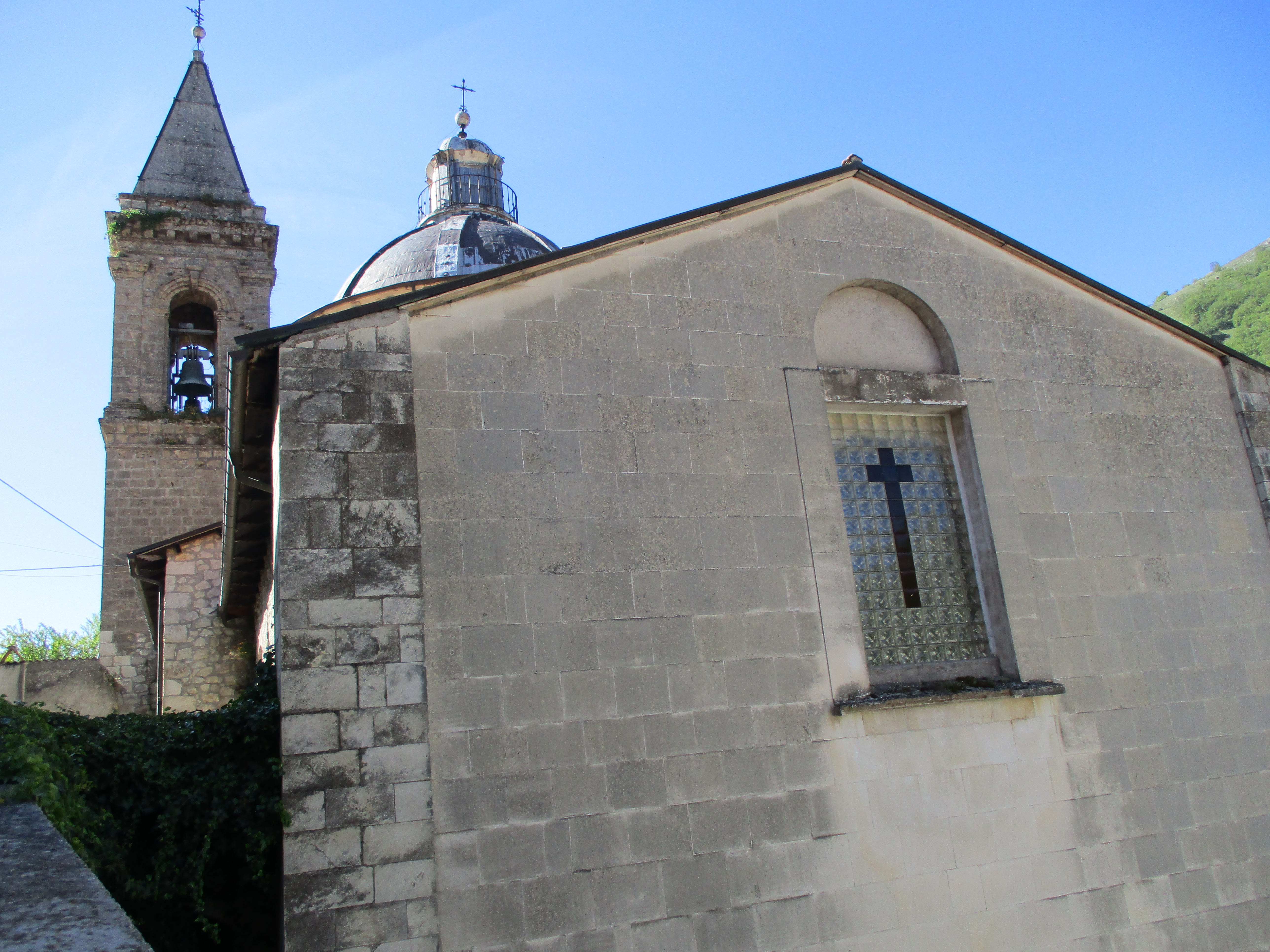 Parte superiore della facciata e campanile di San Domenico